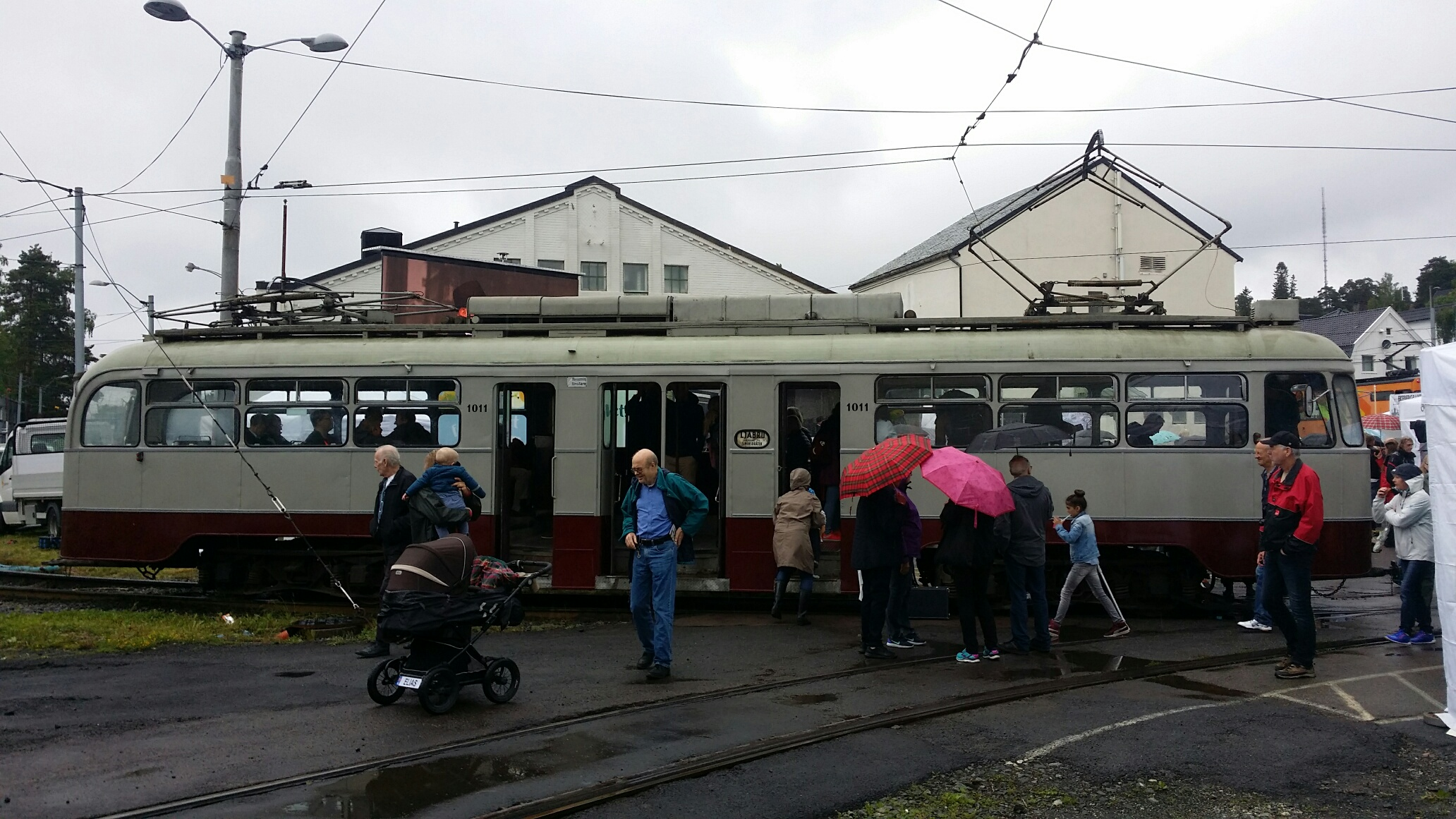 Ekebergbanens vogn 1011, bygget på Holtet i 1952, er bevart som museumsvogn. På bildet deltar den ved feiringen av banens 100-årsjubileum på Holtet 11. juni 2017.